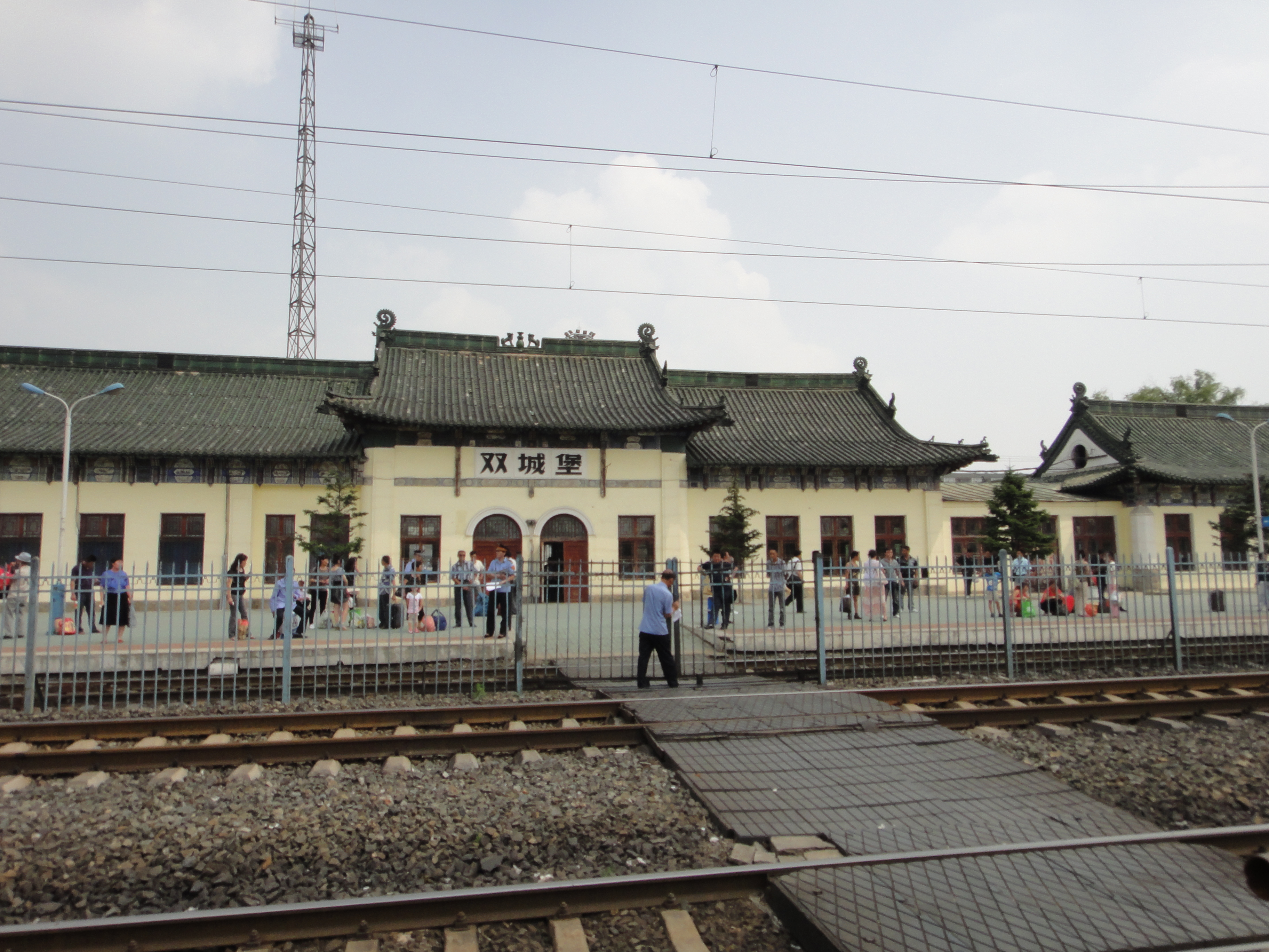 中文（中国大陆）